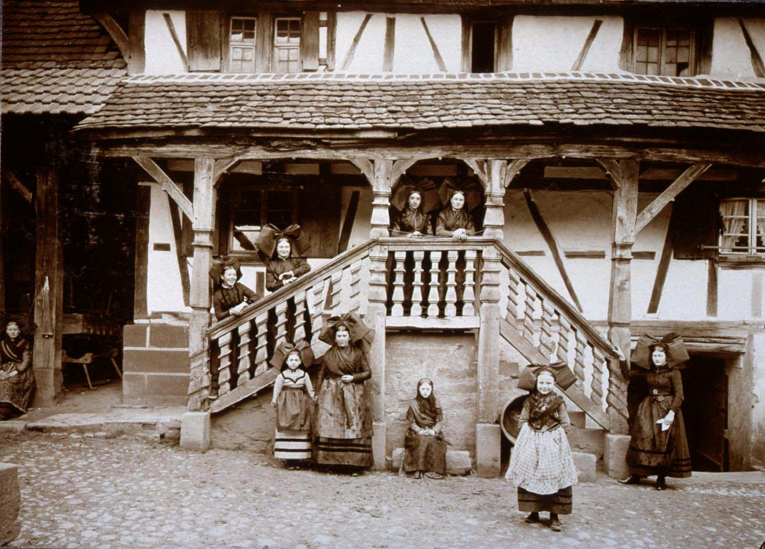 Escalier de la ferme Jacob de Buswiller, Alsace